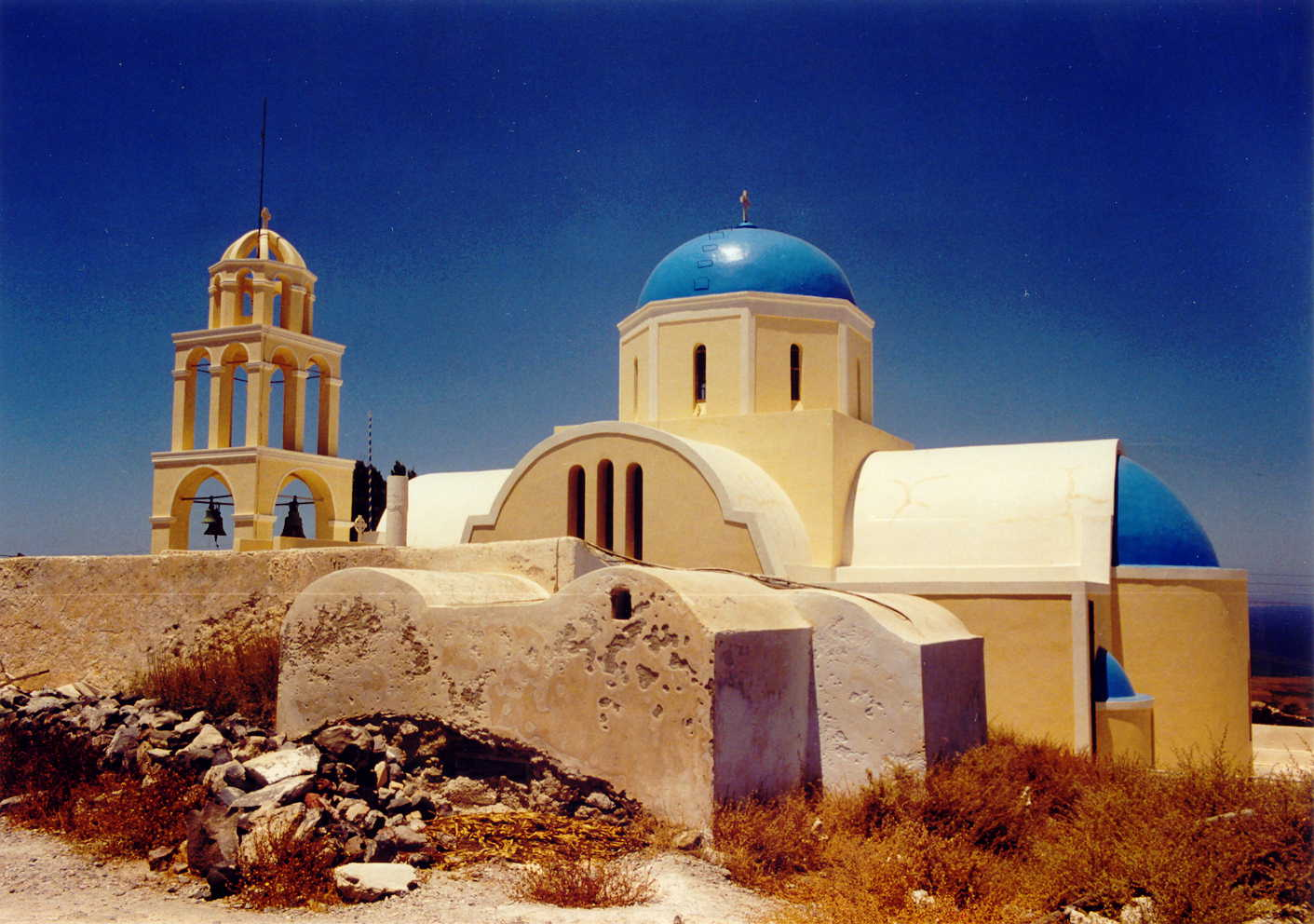 Kirche mit charakterischter blauen Kuppel und Glockenturm in Oia